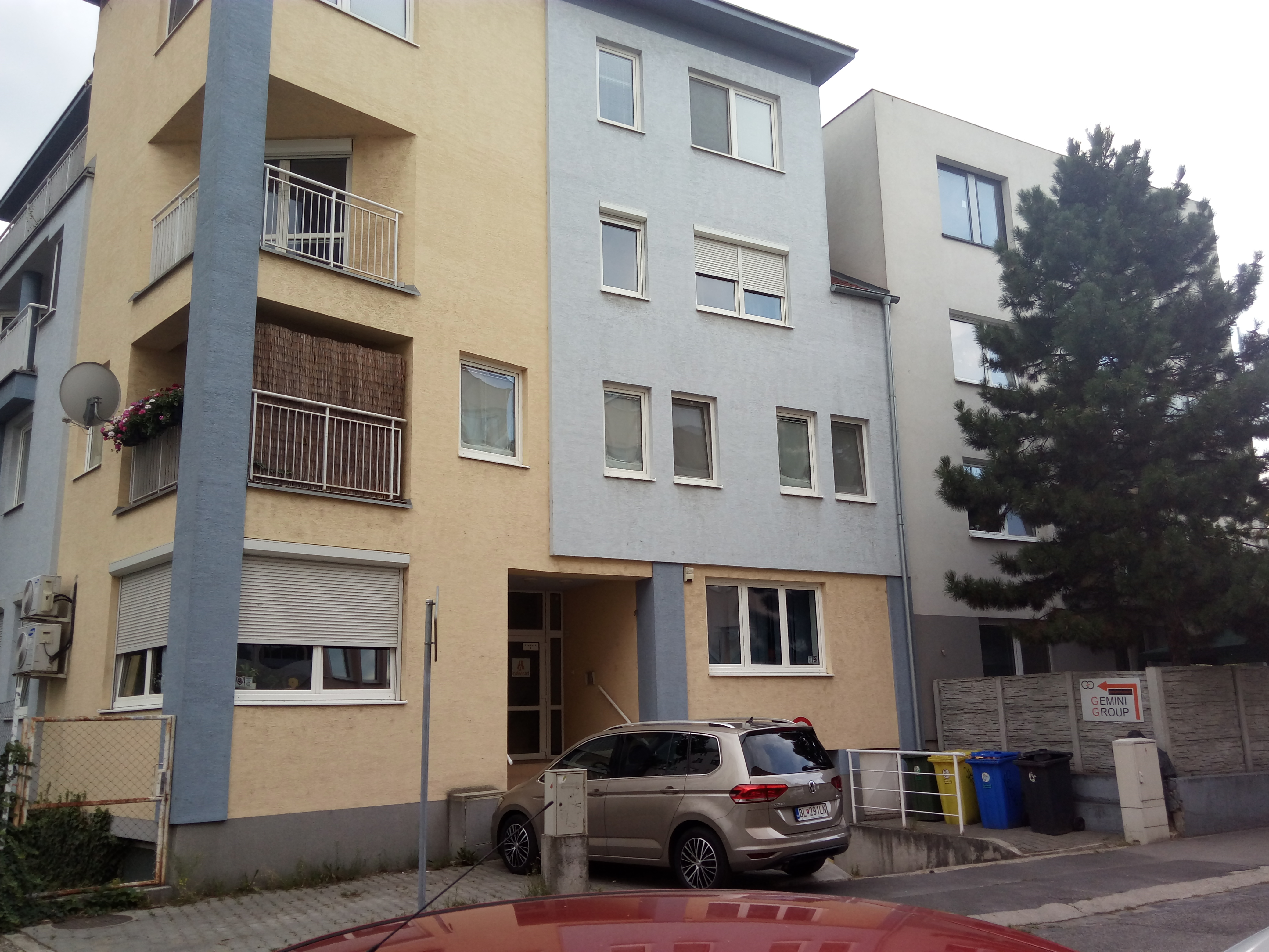 Pluhová 1, Nové Mesto, Bratislava